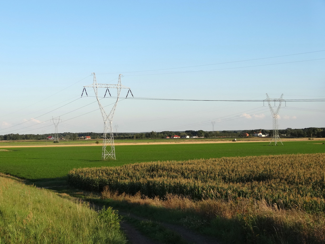 Otorowo, gmina Solec Kujawski, powiat bydgoski, województwo kujawsko-pomorskie. Widok z wiślanego wału przeciwpowodziowego